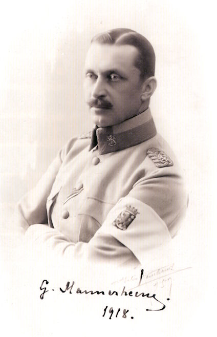 Kenraali Mannerheim vuonna 1918.